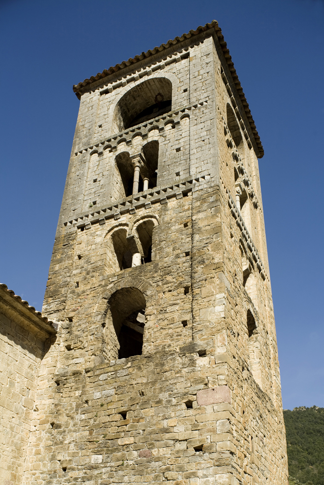 Església de Sant Cristòfol de Beget (Camprodon - Ripollès)